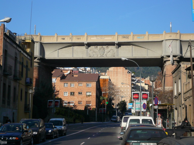 Viaducte de Vallcarca, Districte de Gràcia, Barcelona